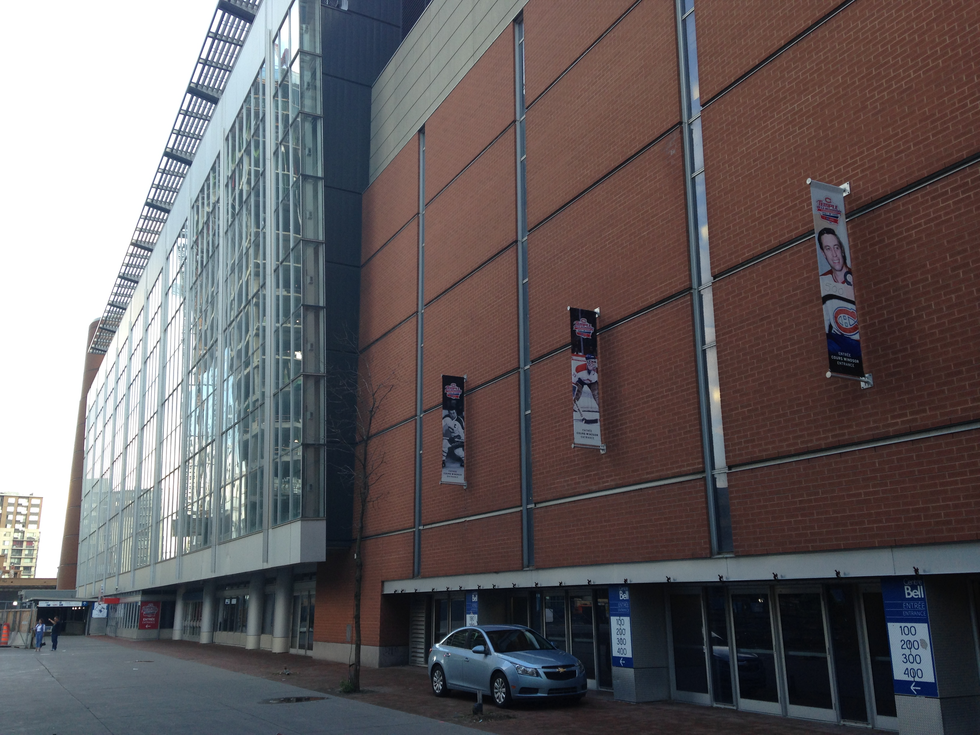 Bell Centre